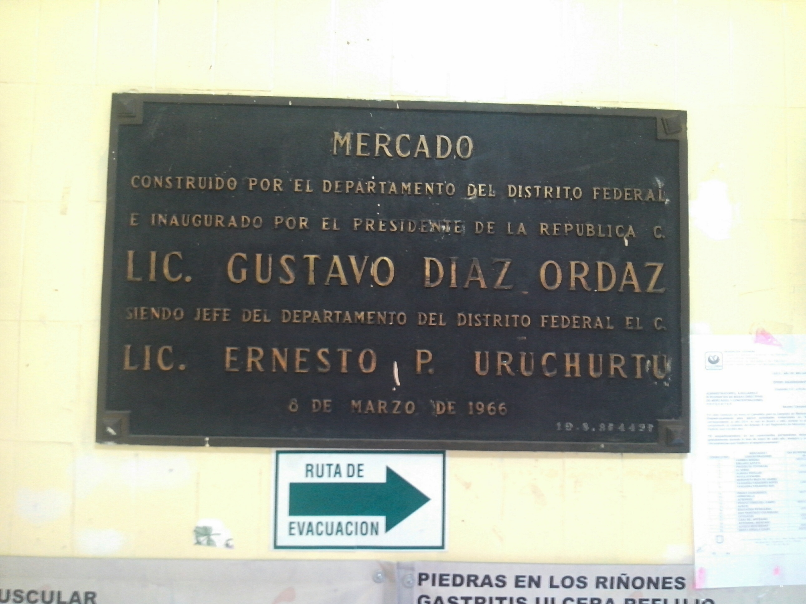 Consigna la inauguración del mercado por Gustavo Díaz Ordaz y Ernesto P. Uruchurtu.